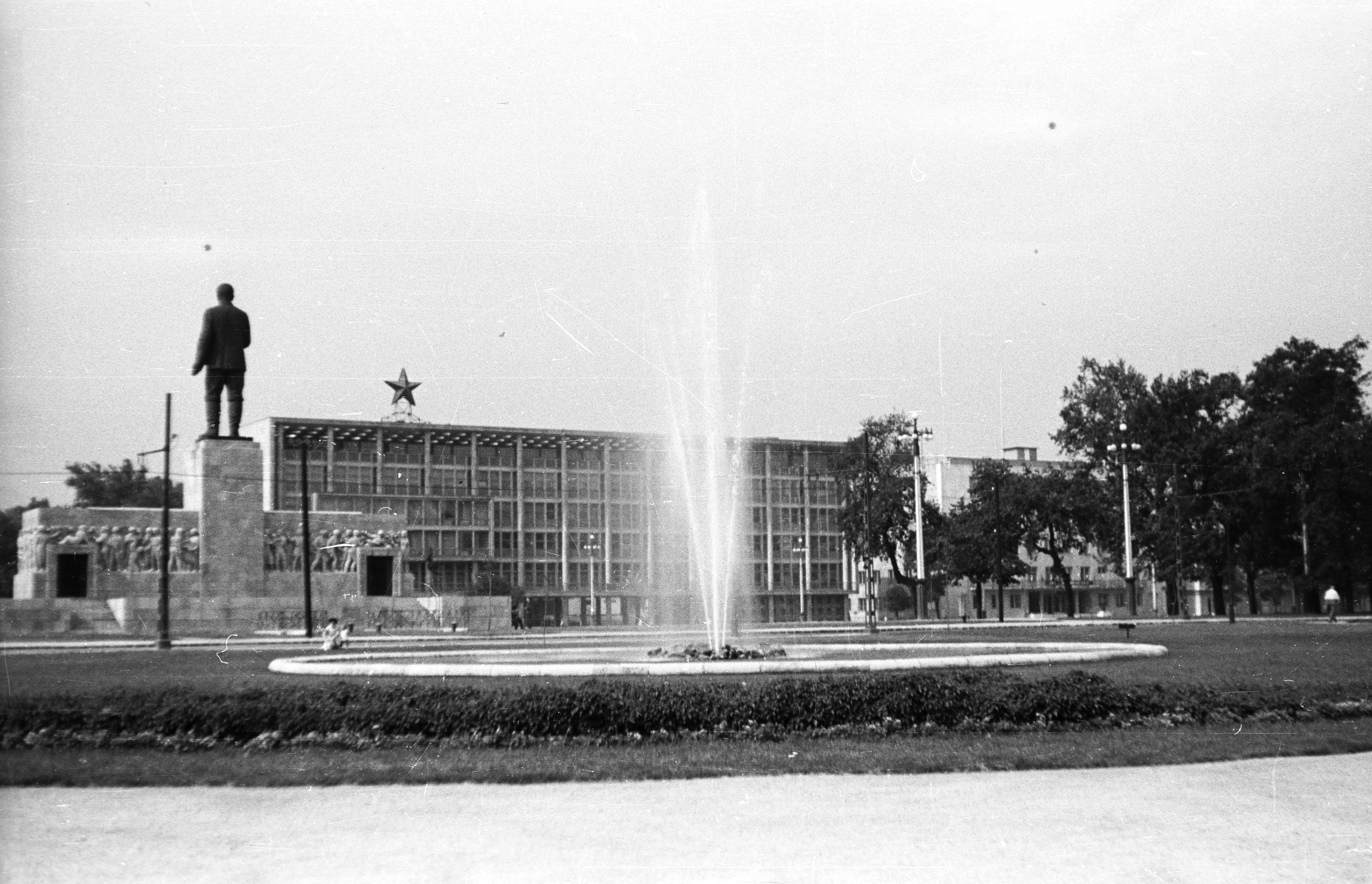 szemben az Ötvenhatosok tere (Sztálin tér), Sztálin szobor, háttérben a MÉMOSZ (Magyarországi Építőipari Munkások Országos Szövetsége) székháza. Location: Hungary, Budapest XIV. Tags: sculpture, Red Star, Budapest Title: szemben az Ötvenhatosok tere (Sztálin tér), Sztálin szobor, háttérben a MÉMOSZ (Magyarországi Építőipari Munkások Országos Szövetsége) székháza.